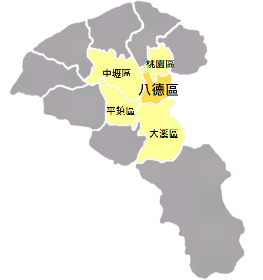 八德區位置圖